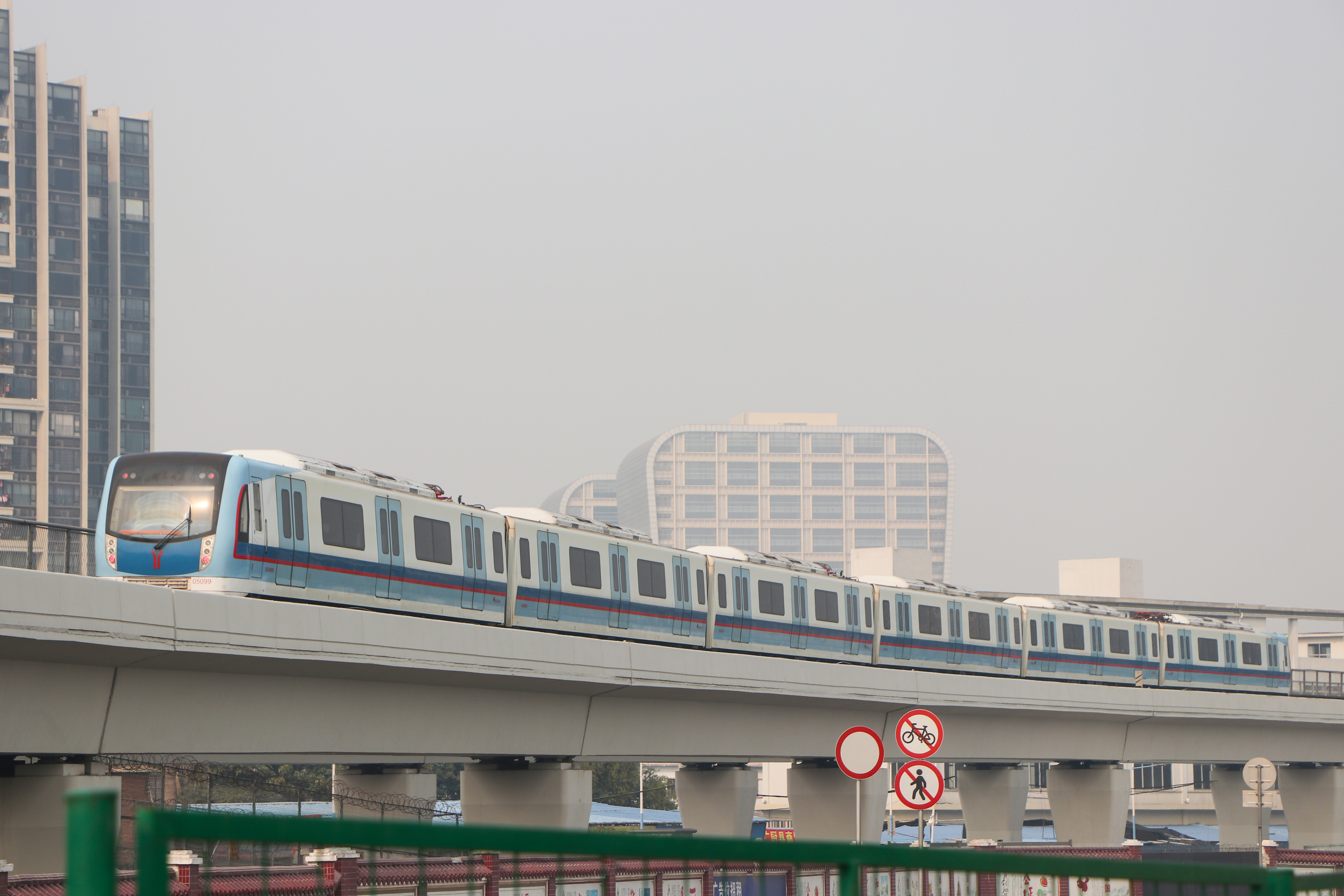 广州地铁5号线L4-I型列车（099100）即将到达坦尾站